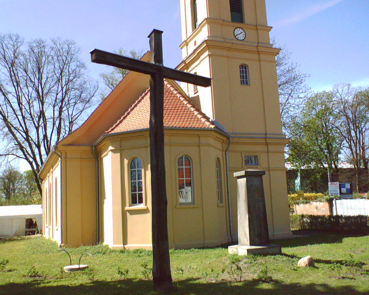 Dorfkirche Bohnsdorf, Kreuz und Gefallenenstele